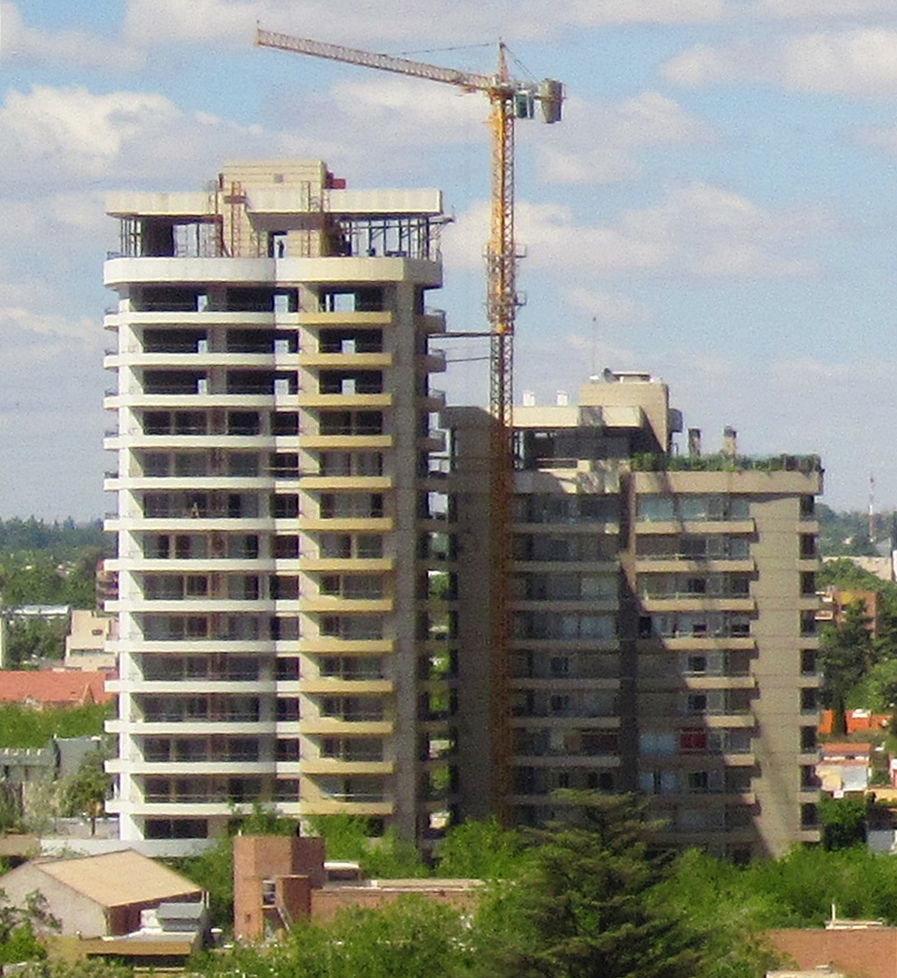 Tašlḥiyt/ⵜⴰⵛⵍⵃⵉⵜ: Torres Agustinas, a la izquierda el edificio más alto de la Ciudad de Godoy Cruz.